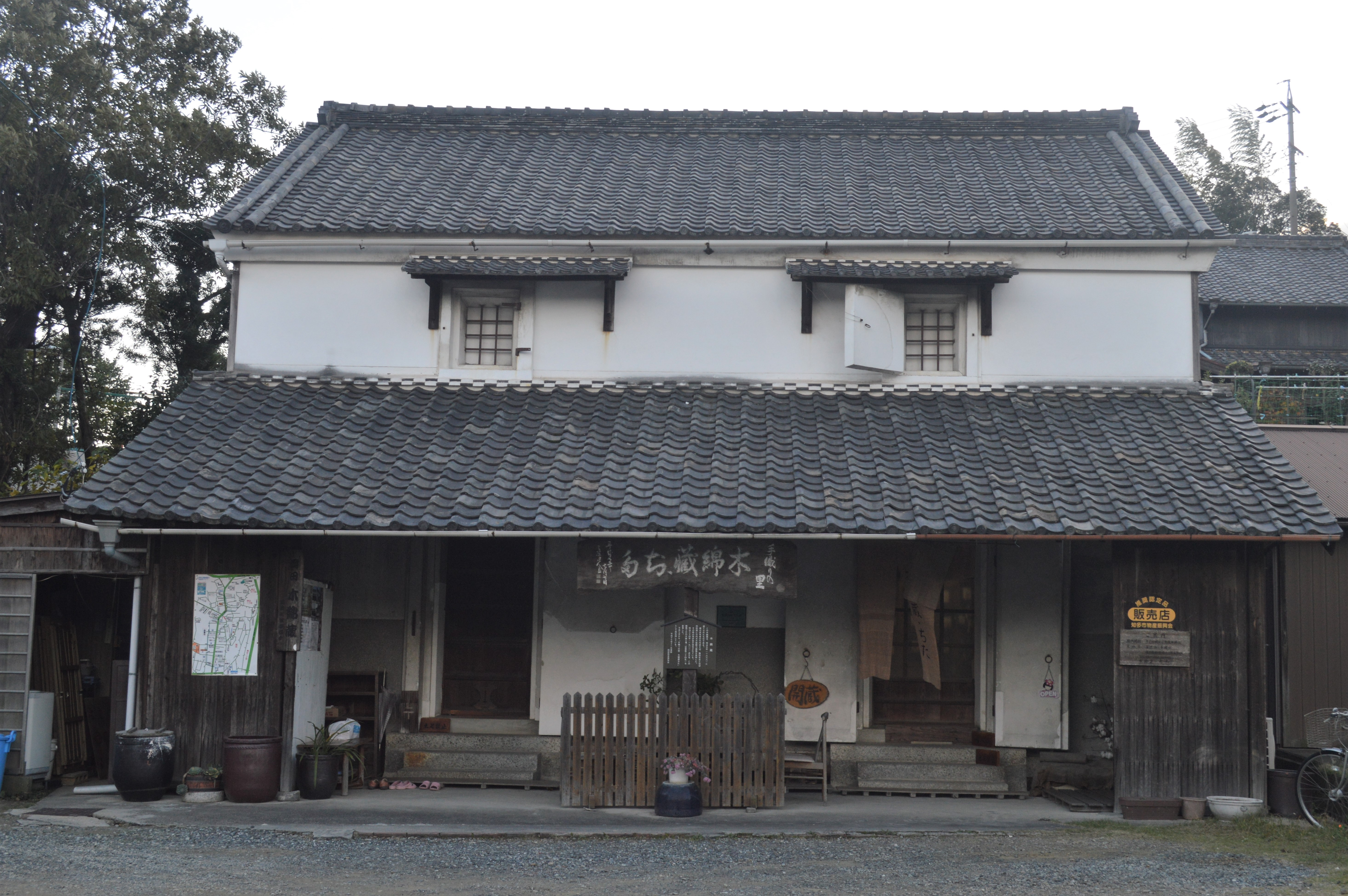 愛知県知多市にある知多木綿の展示・体験施設「手織りの里 木綿蔵・ちた」（旧竹内虎王商店木綿蔵）。国の登録有形文化財。